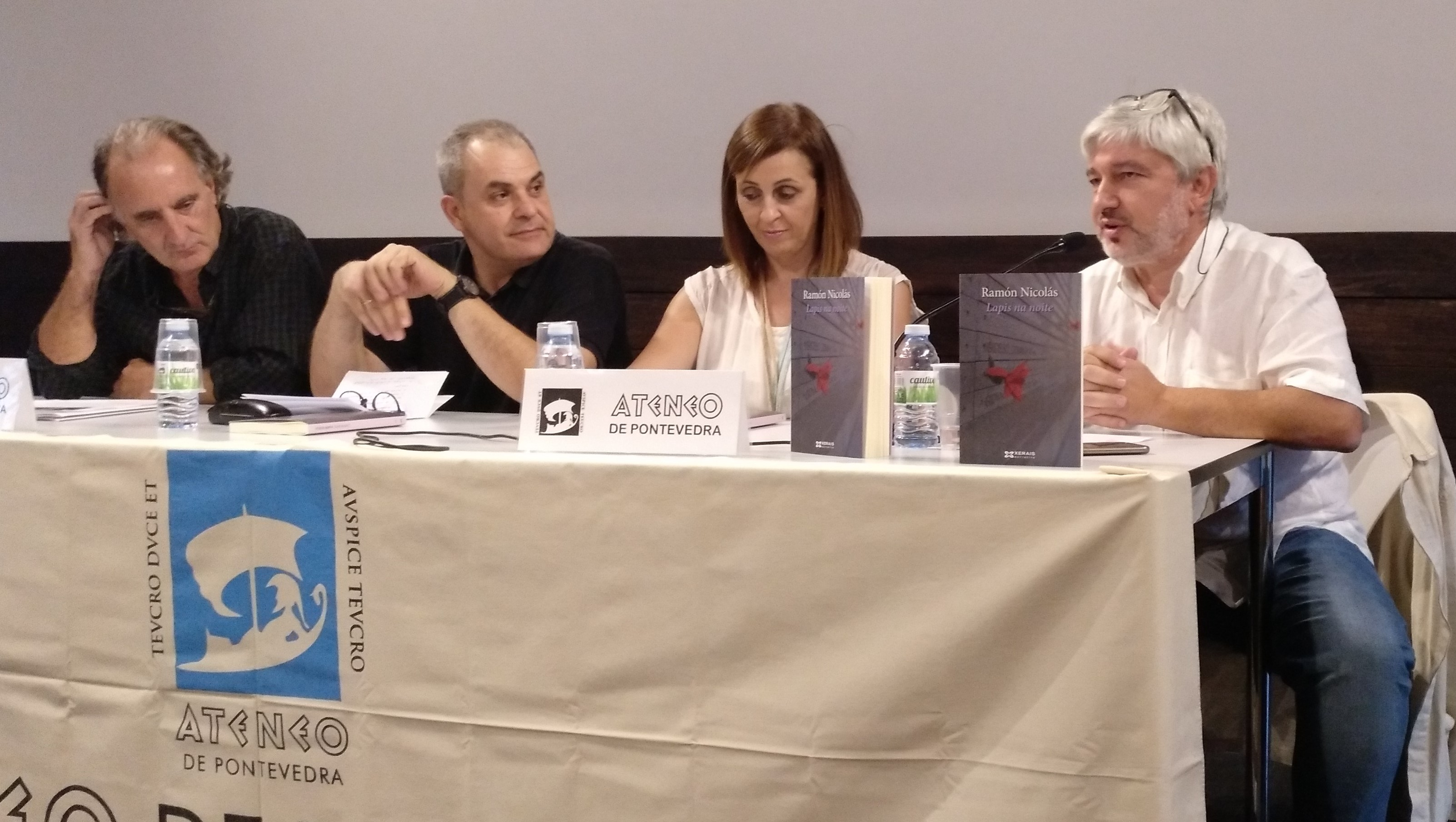 Presentación de "Lapis na noite" de Ramón Nicolas: Xaime Toxo, Ramón Nicolás, Montse Fajardo, Fran Alonso. Casa das Campás de Pontevedra. 18/09/2018